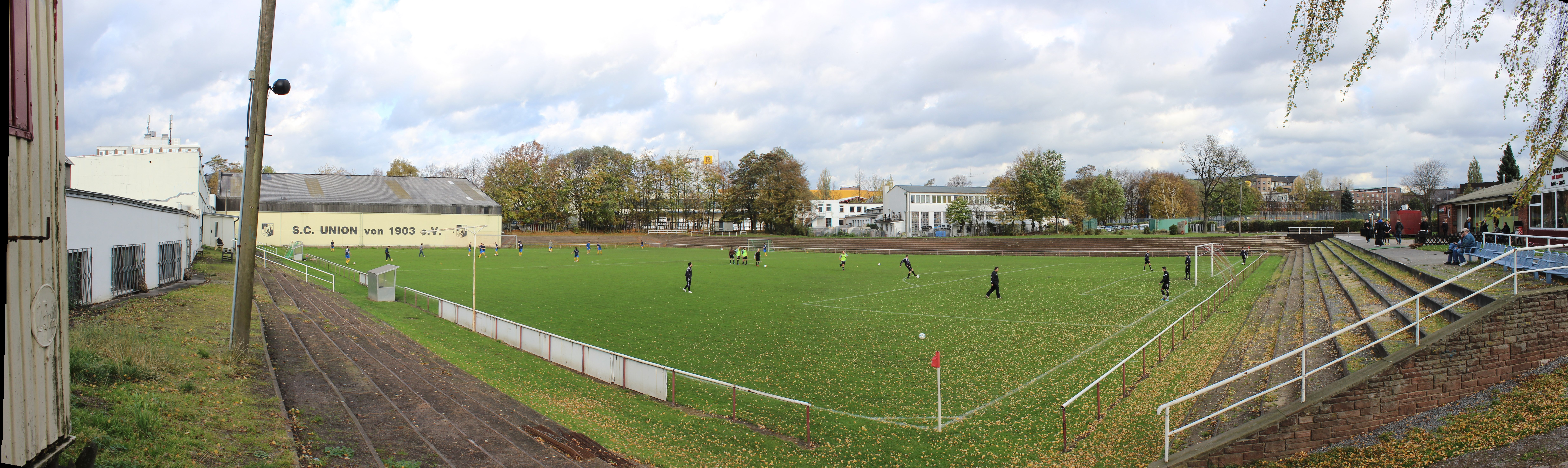 SC Union 03 Altona